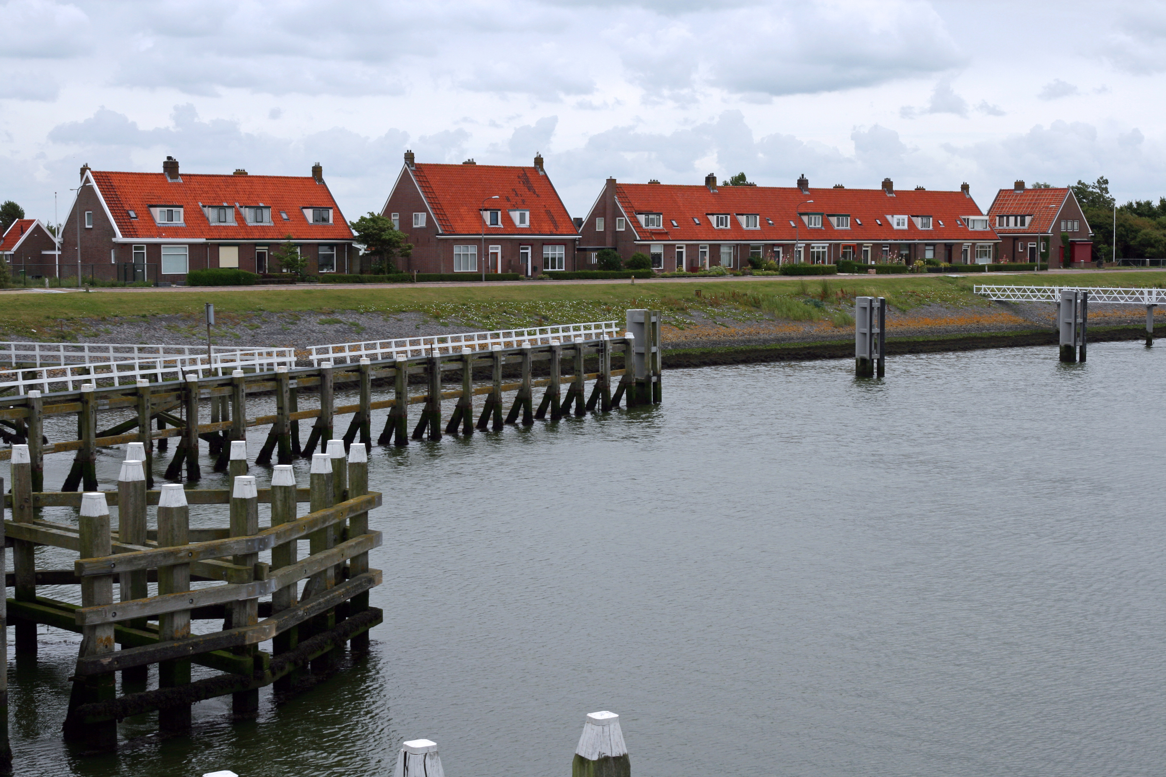 Huizen in Kornwerderzand